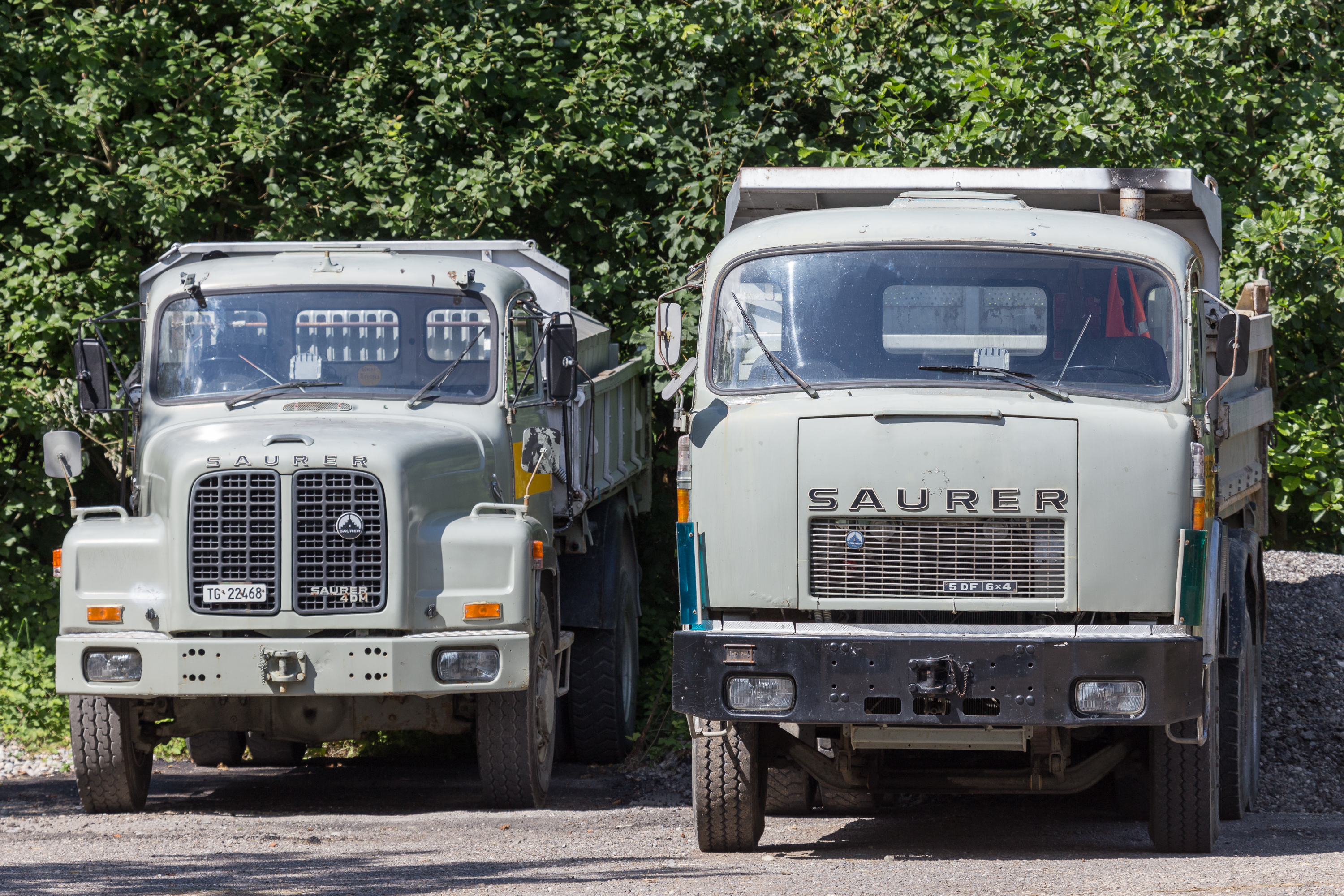 Saurer 4DM und 5DF Kipper